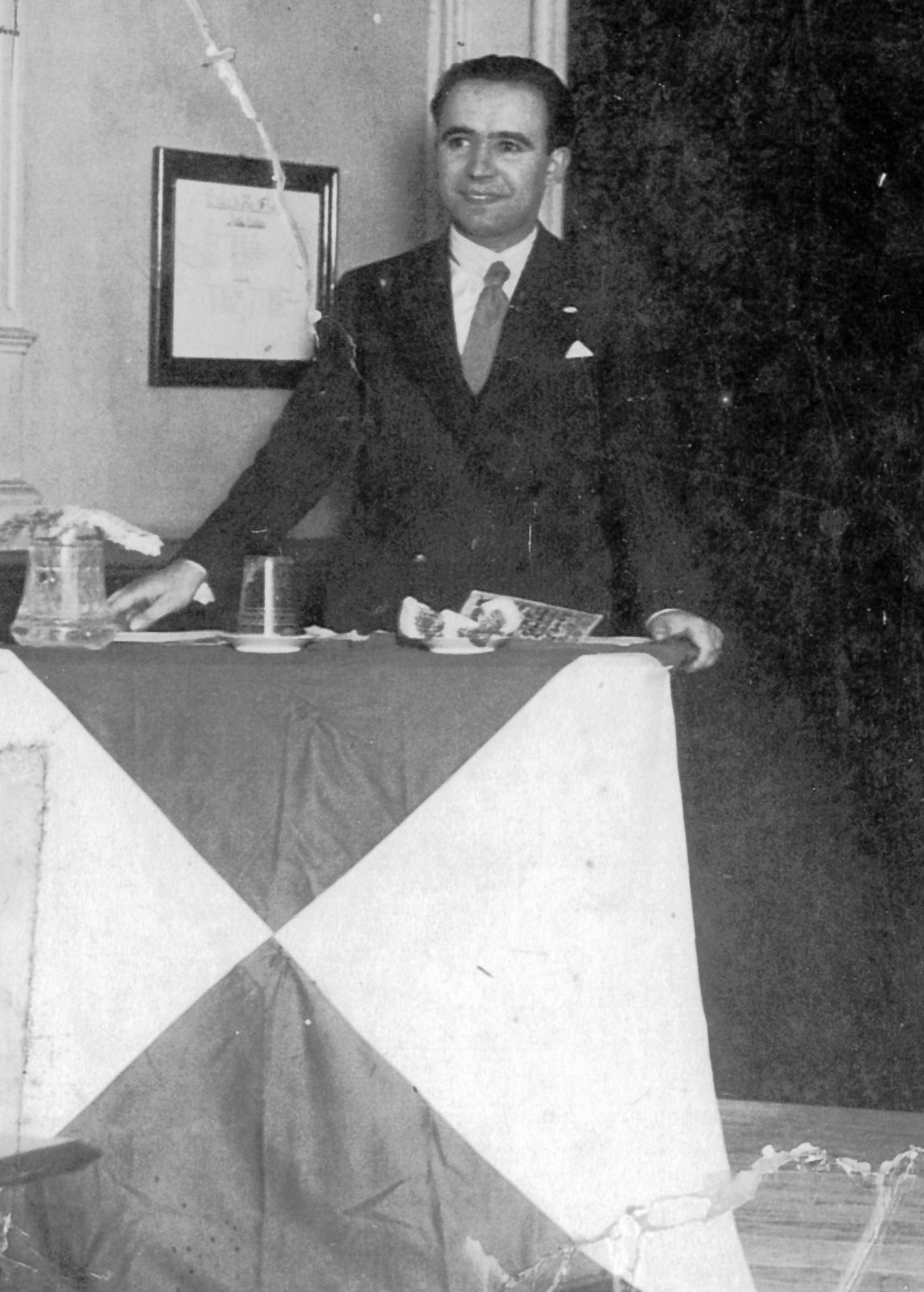 Instantánea de Alexandre Bóveda conferenciando sobre o Estatuto de Autonomía, nos locais da Asociación Galega de Contábeis. Vigo, 1935.